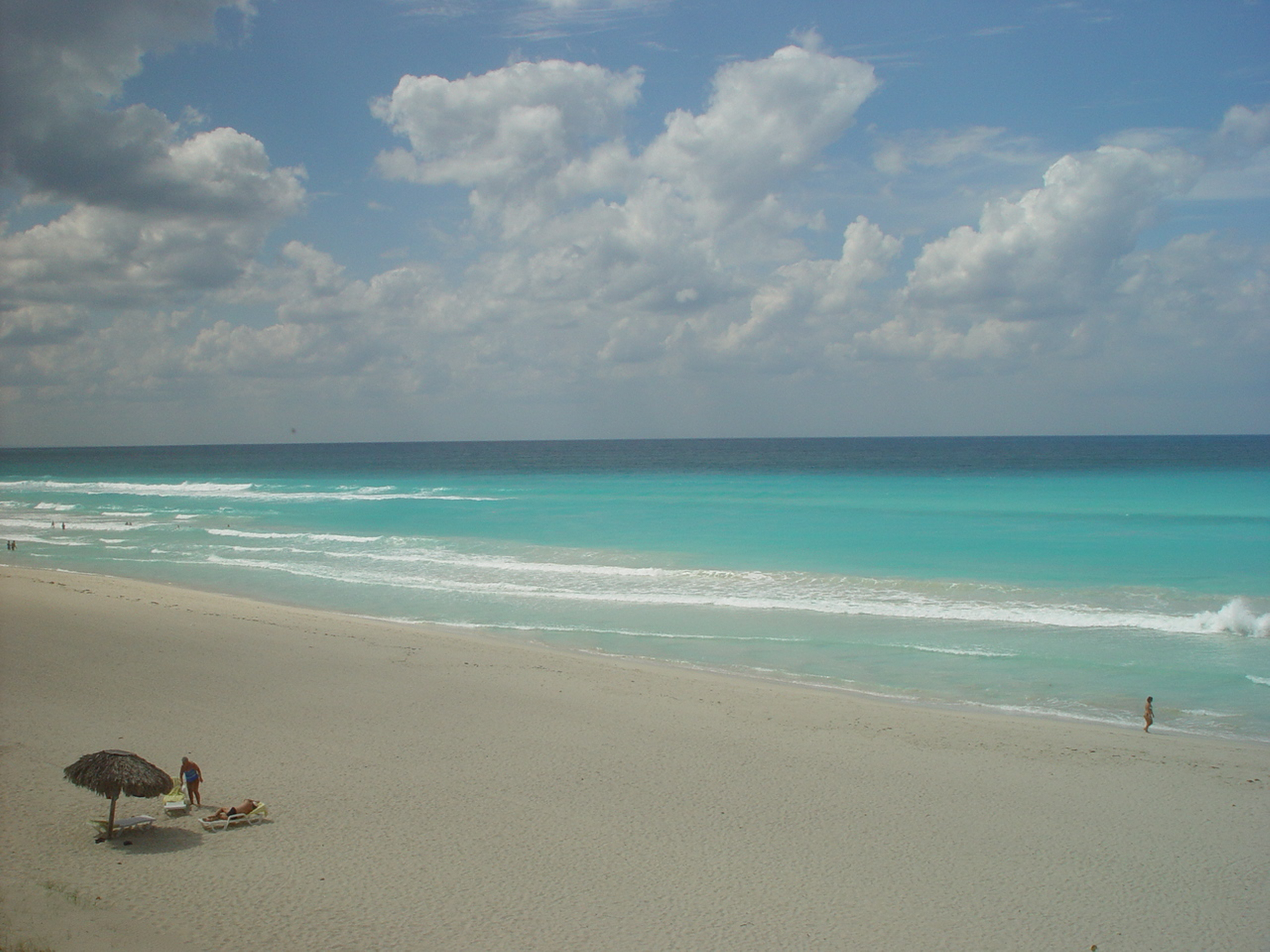 Stranden på Varadero